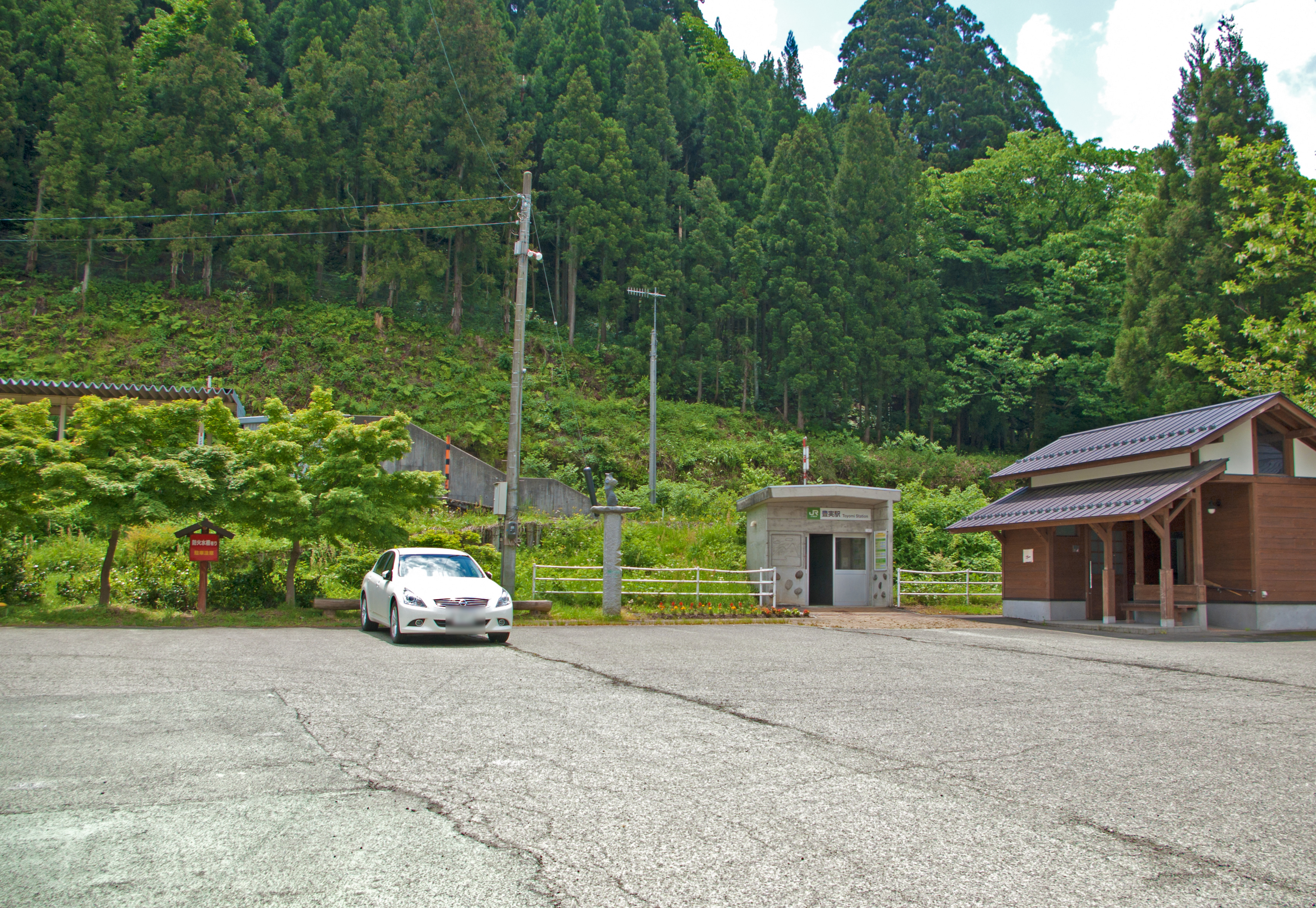 東日本旅客鉄道株式会社磐越西線豊実駅